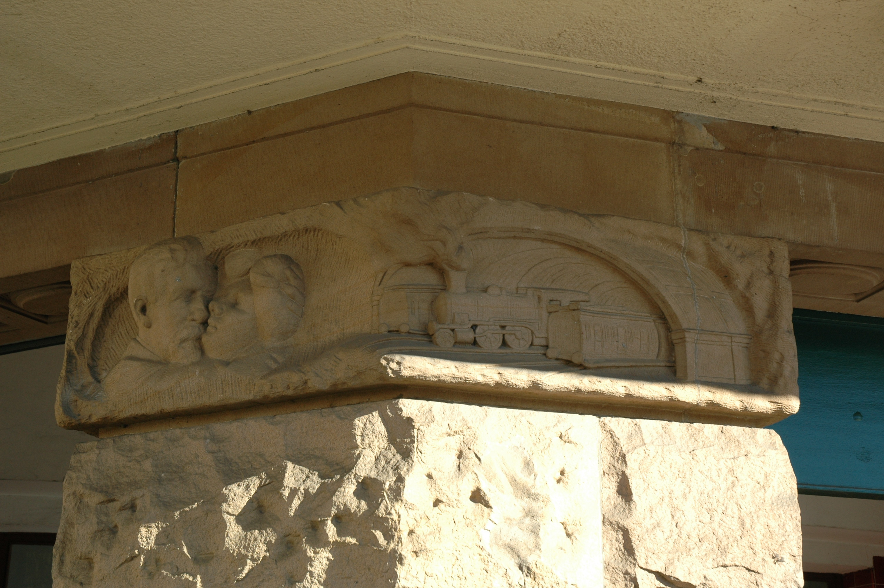 Wuppertal-Vohwinkel, Relief am Eingangsportal des Bahnhofs